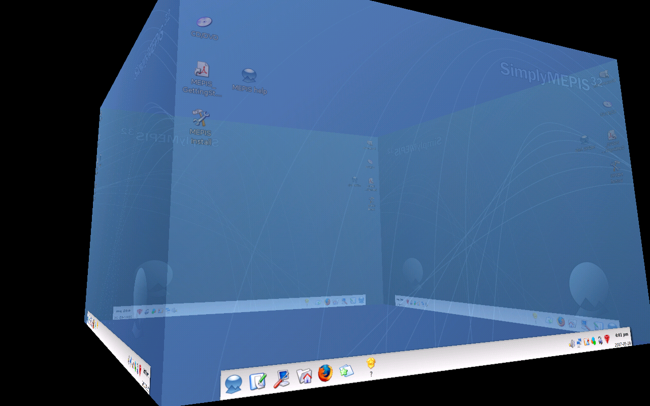 SimplyMEPIS en LiveCD corriendo KDE y Beryl